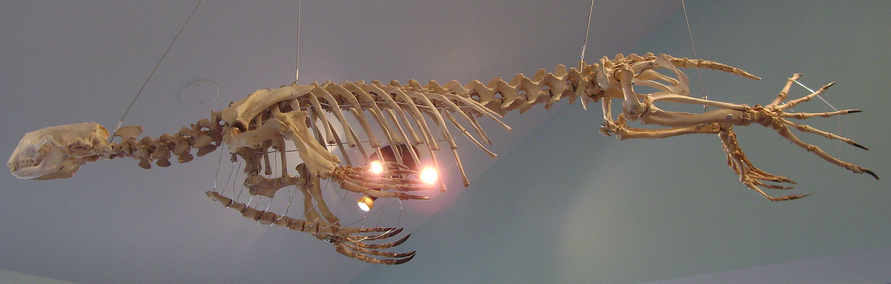 Squelette de phoque gris (Halichoerus grypus) exposé à Station exploratoire du Saint-Laurent, à Rivière-du-Loup, Québec. C'était une jeune femelle qui s'est empêtrée dans les engins de pêche à Kamouraska.